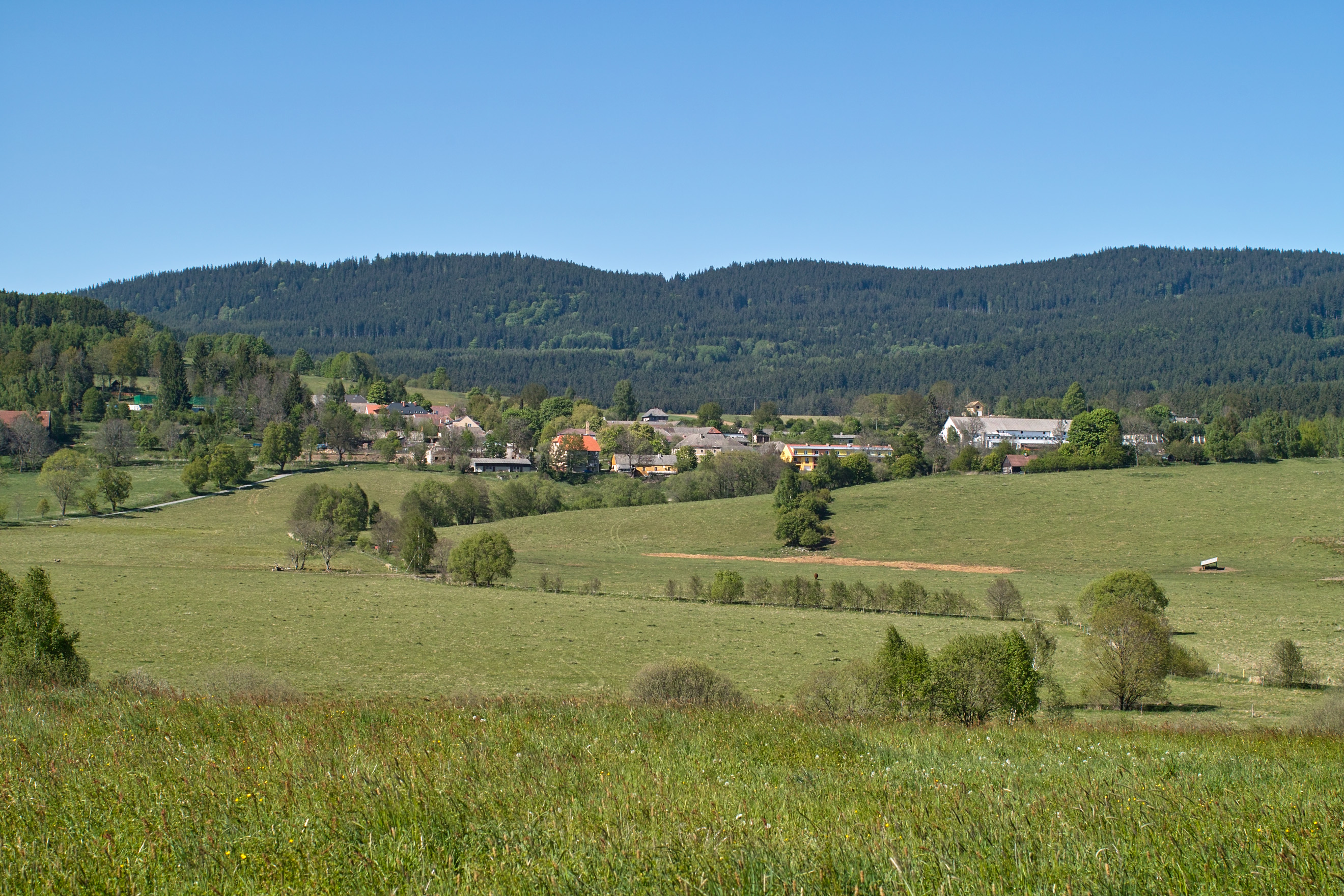 Pernek u Horní Plané, vrch Houba - 864 m n. m. (zcela vlevo v popředí) a vrchy Hvězdáře (v pozadí; vlevo Hvězda - 1145 m n. m., vpravo Nad Hospodárnicí - 1182 m n. m.) ve vojenském újezdu Boletice